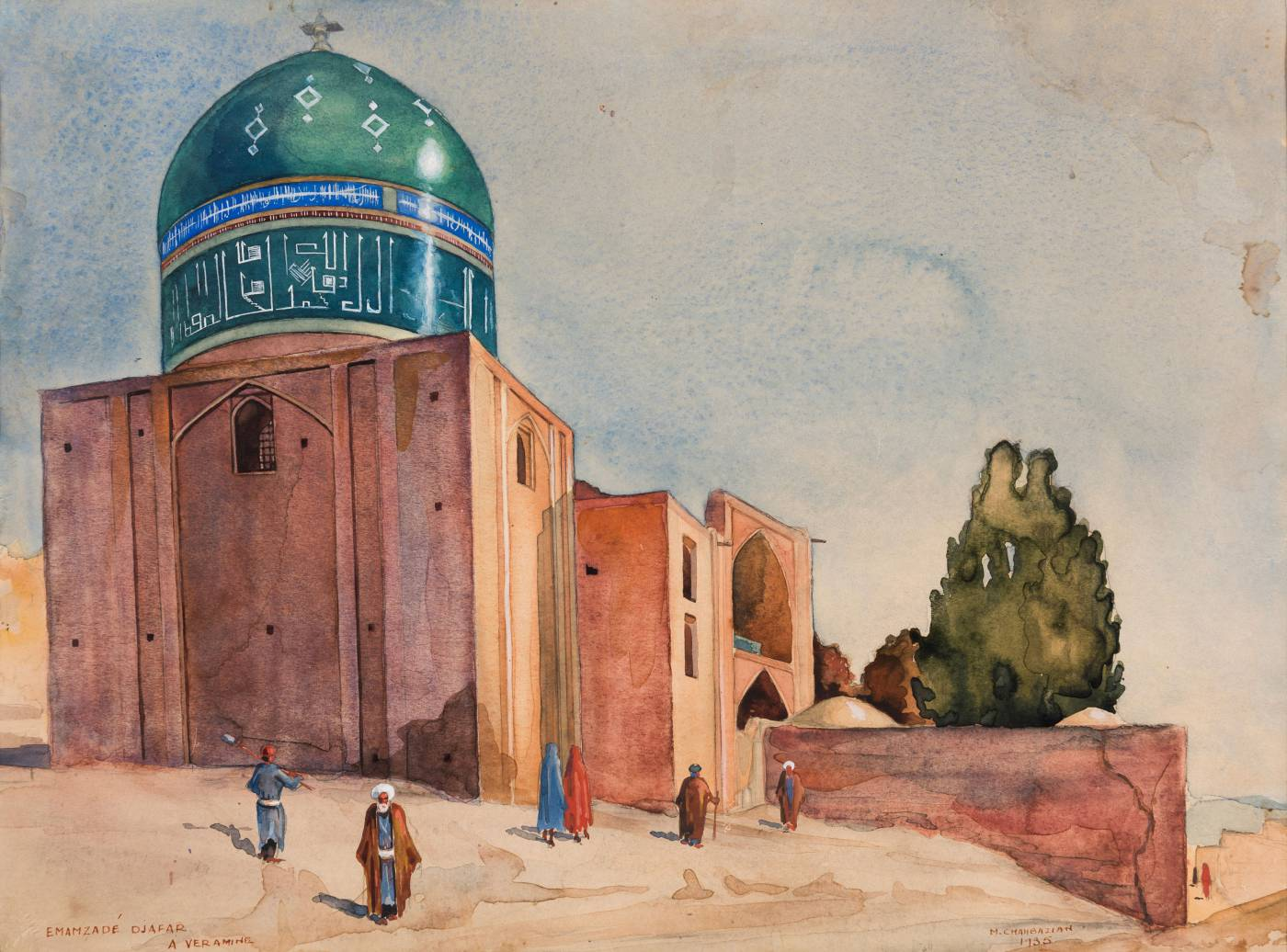 امامزاده جعفر، ورامین